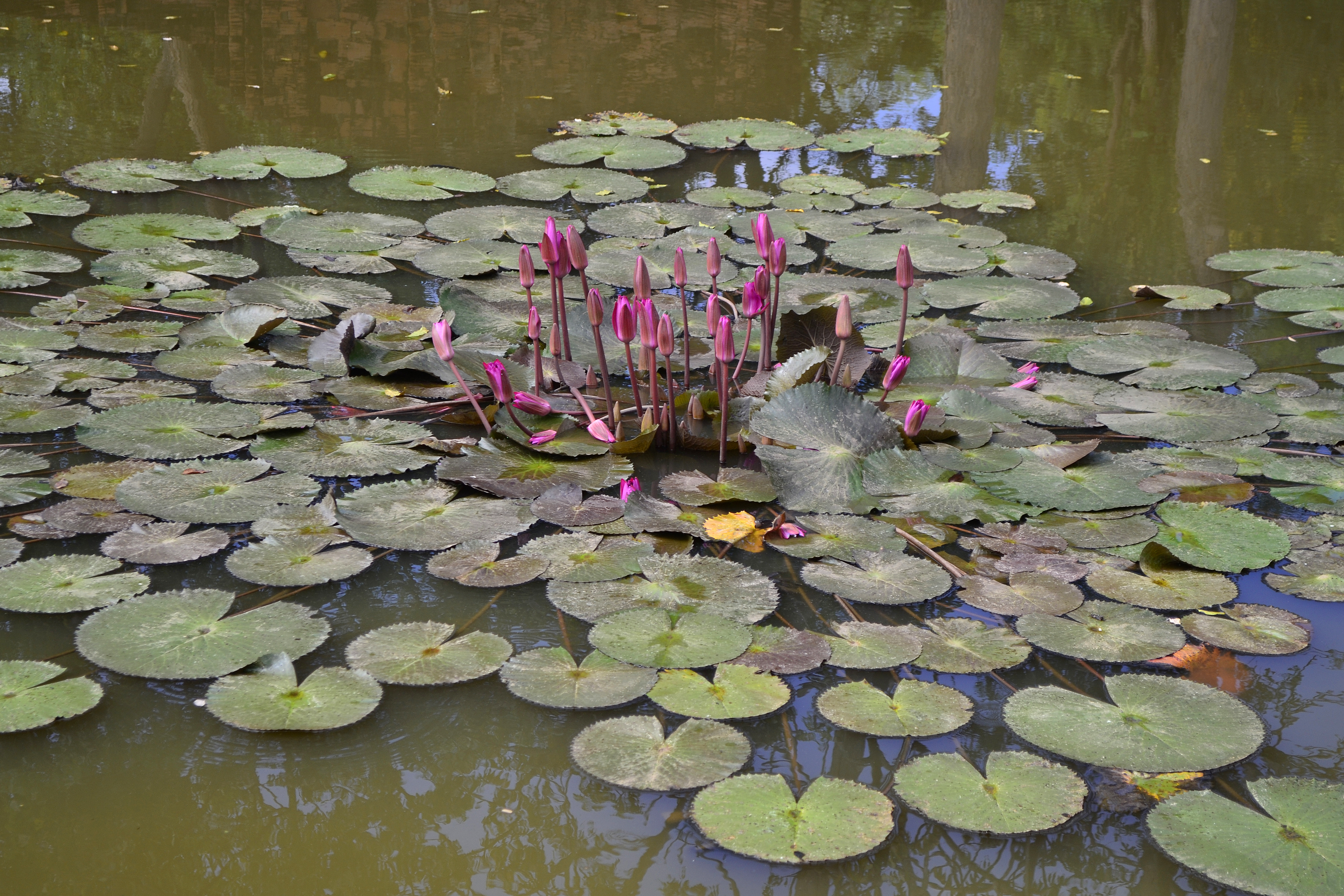 Wat Chetuphon (วัดเชตุพน) im Geschichtspark Sukhothai